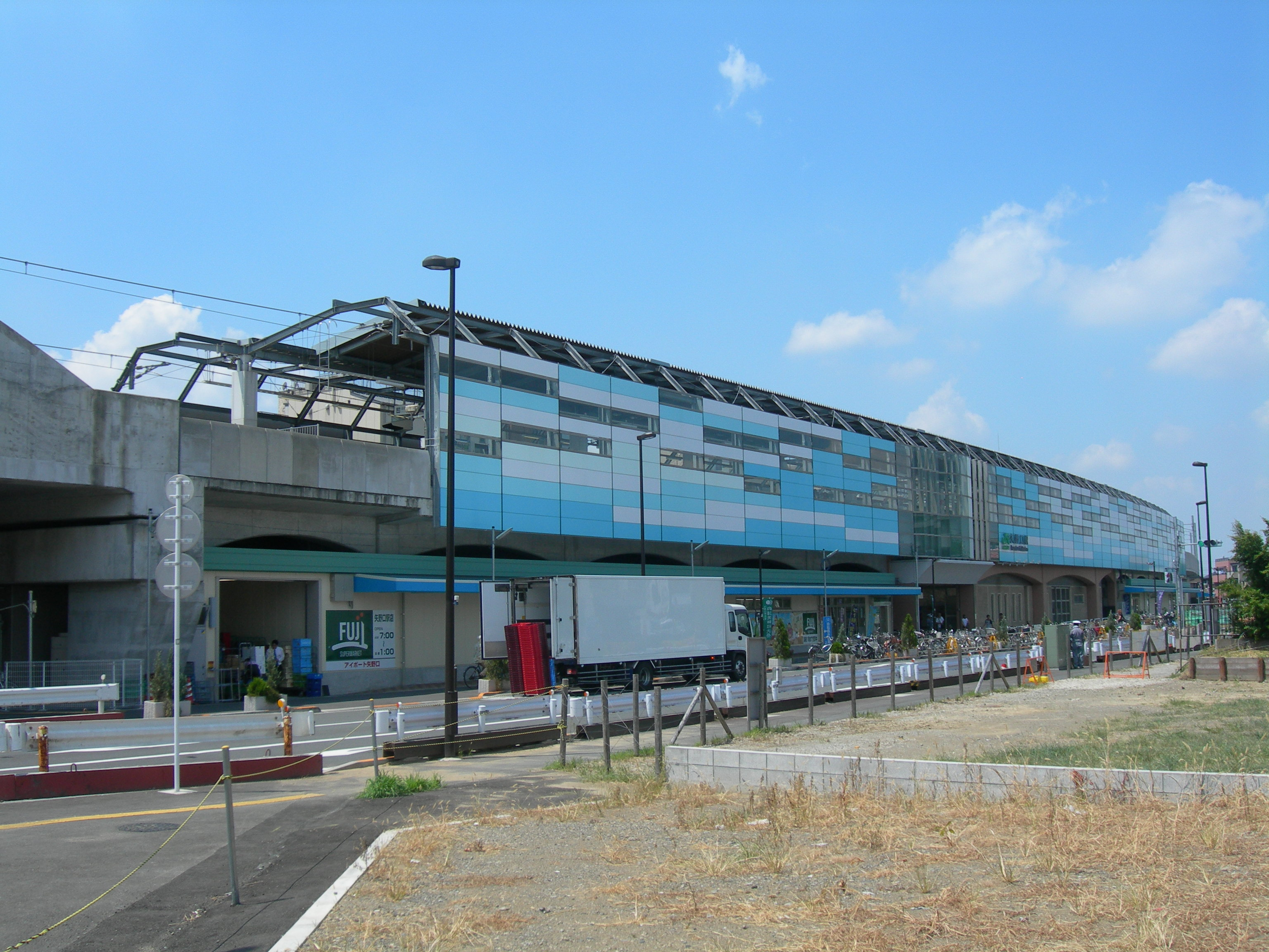 矢野口駅北側